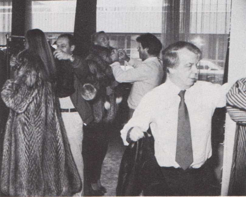 Leistungswettbewerb des deutschen Kürschnerhandwerks 1981 Links Walter J. Ziegler, Fa. Geng, Mannheim; Mitte Clemens Grosse-Segerath, Oberhausen; rechts vorn Walter Schöne, Oberhausen. - Drei Jurys aus je sieben Mitgliedern bewerteten knapp 1000 Modelle.